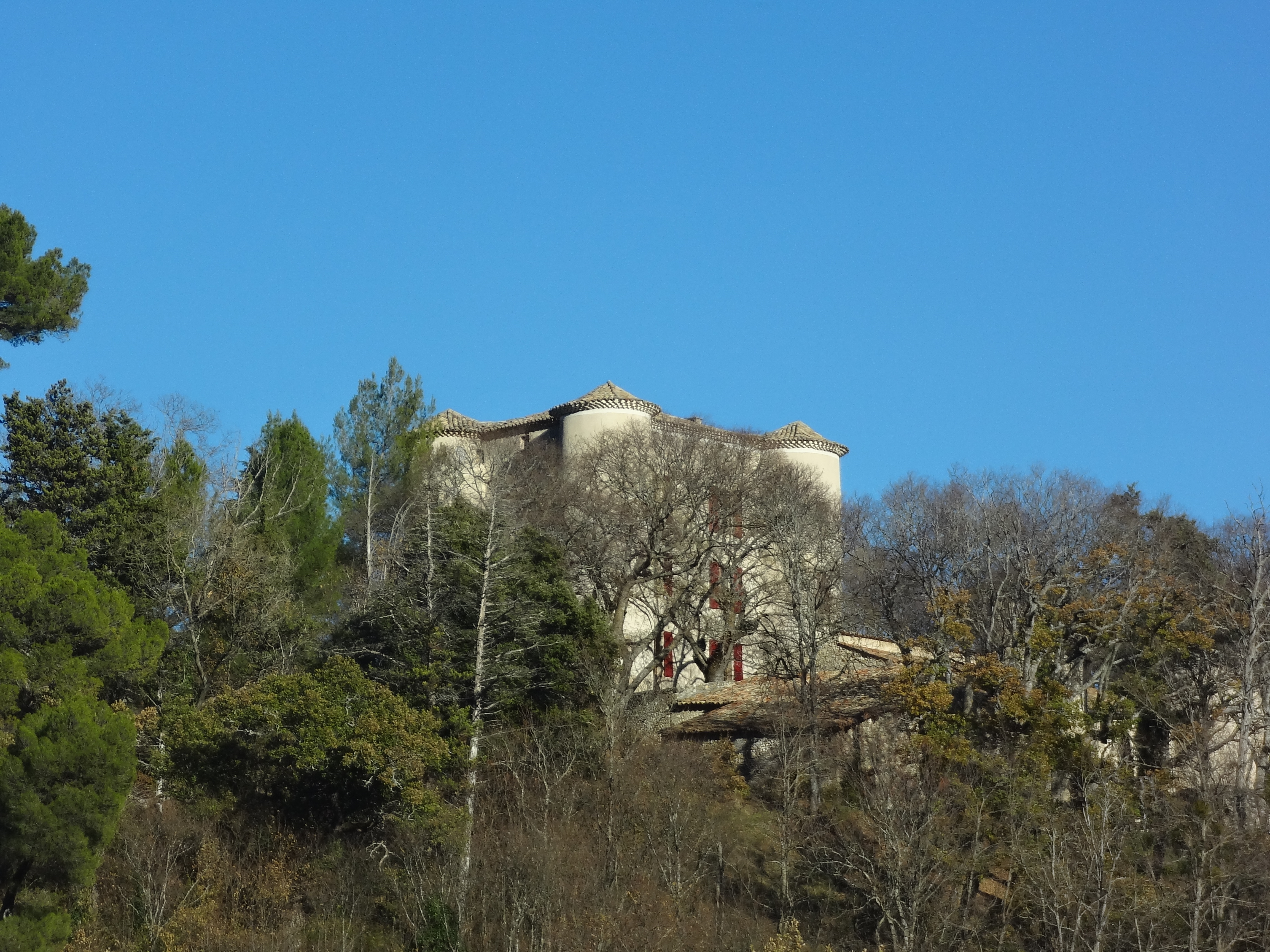 Château de Fontenelle à Mirabeau